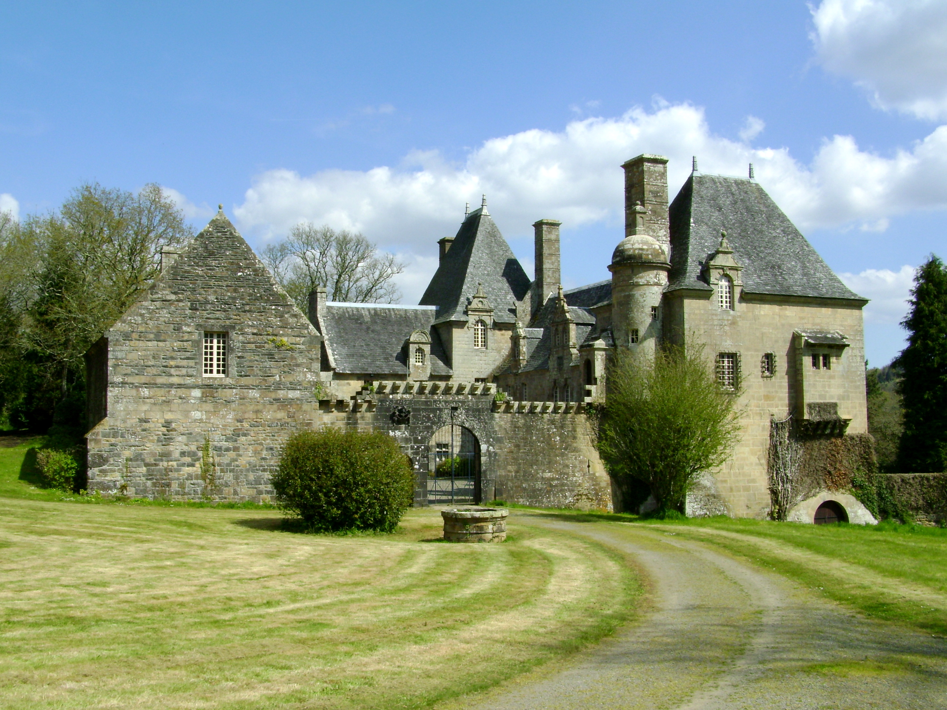 Château de Rosmorduc.JPG